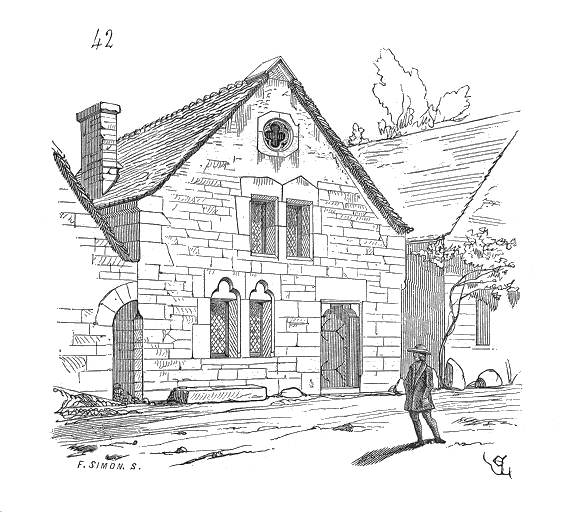 ... Les maisons de paysans encore bien conservées, dans le village de Rougemont, entre Montbar et Aisy, en fournissent la preuve. Ces maisons, qui datent la plupart du commencement du XIIIe siècle, présentent leur pignon sur la route, sont bâties avec un soin remarquable (42) et possèdent presque toutes un étage au-dessus du rez-de-chaussée; mais il faut dire que ce village dépendait d'une riche abbaye. C'est, en effet, dans le voisinage des établissements religieux que les maisons des campagnards sont le mieux construites, jusques au XIVe siècle, et ces maisons sont habituellement élevées en maçonnerie ...